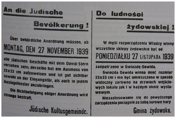 Zarządzenie okupantów Rzeszowa z listopada 1939 r. o opaskach Dawida.